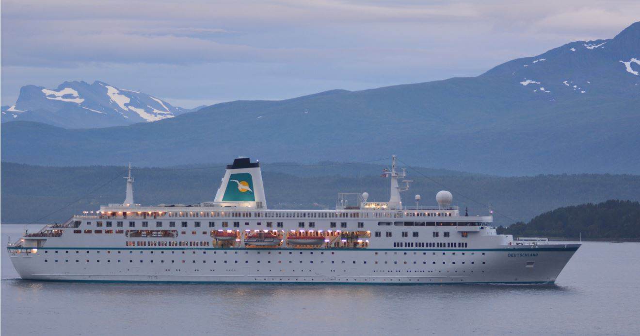 MS Deutschland in der Lackierung von Phoenix am 10. Juli 2016 im Moldefjord Norwegen.